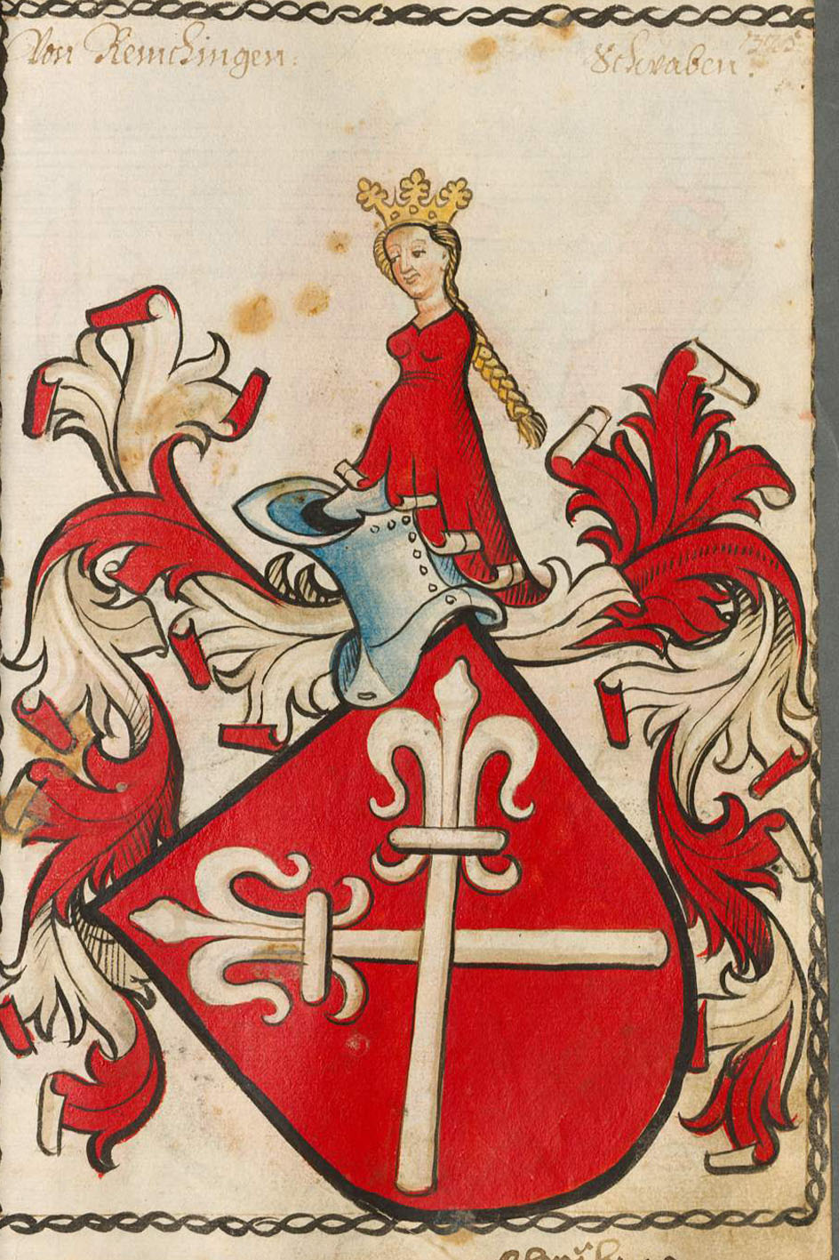 Scheibler'sches Wappenbuch, älterer Teil Remchingen